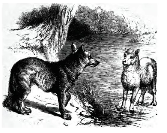 Illustration Harrison Weir in G. F. Townsend, Aesop's Fables, 1867